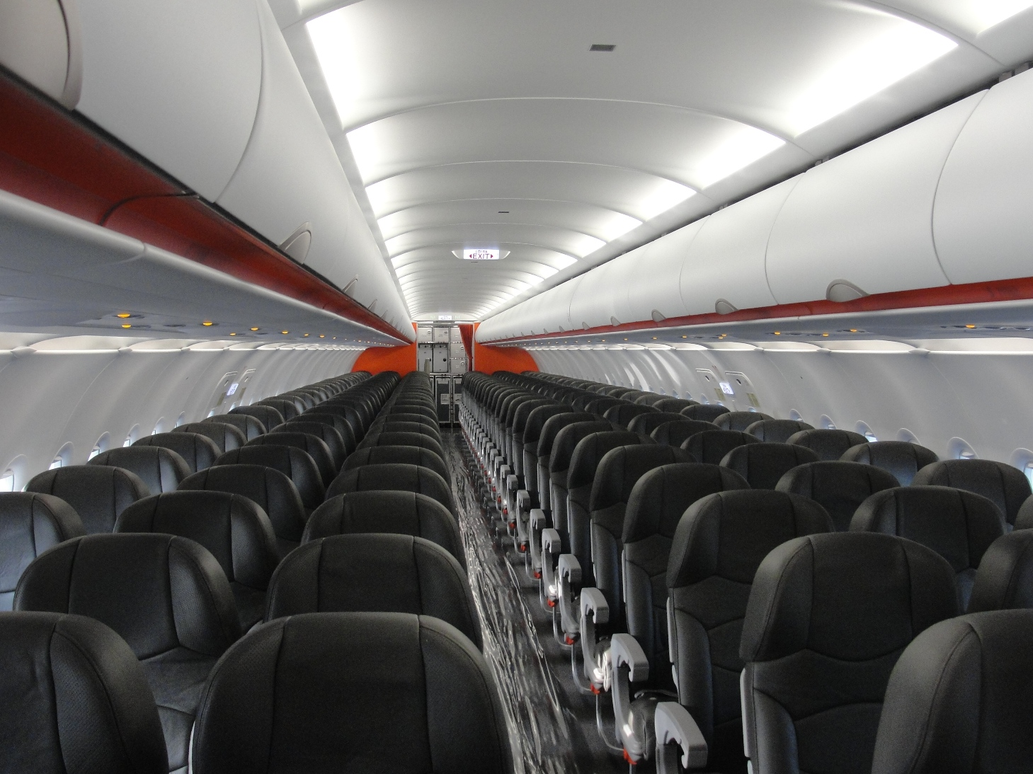 Bên trong máy bay Airbus A320 của Jetstar Pacific